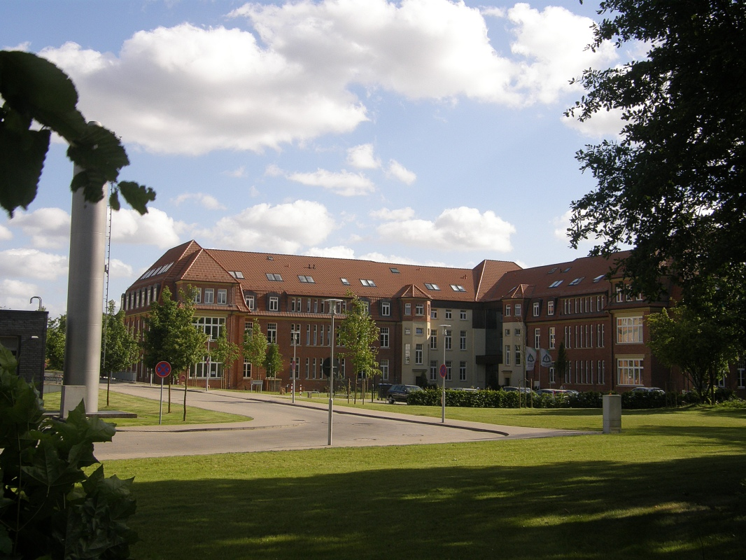 Allgemeines Krankenhaus Barmbek, Altbau.: Heute Firmenzentrale